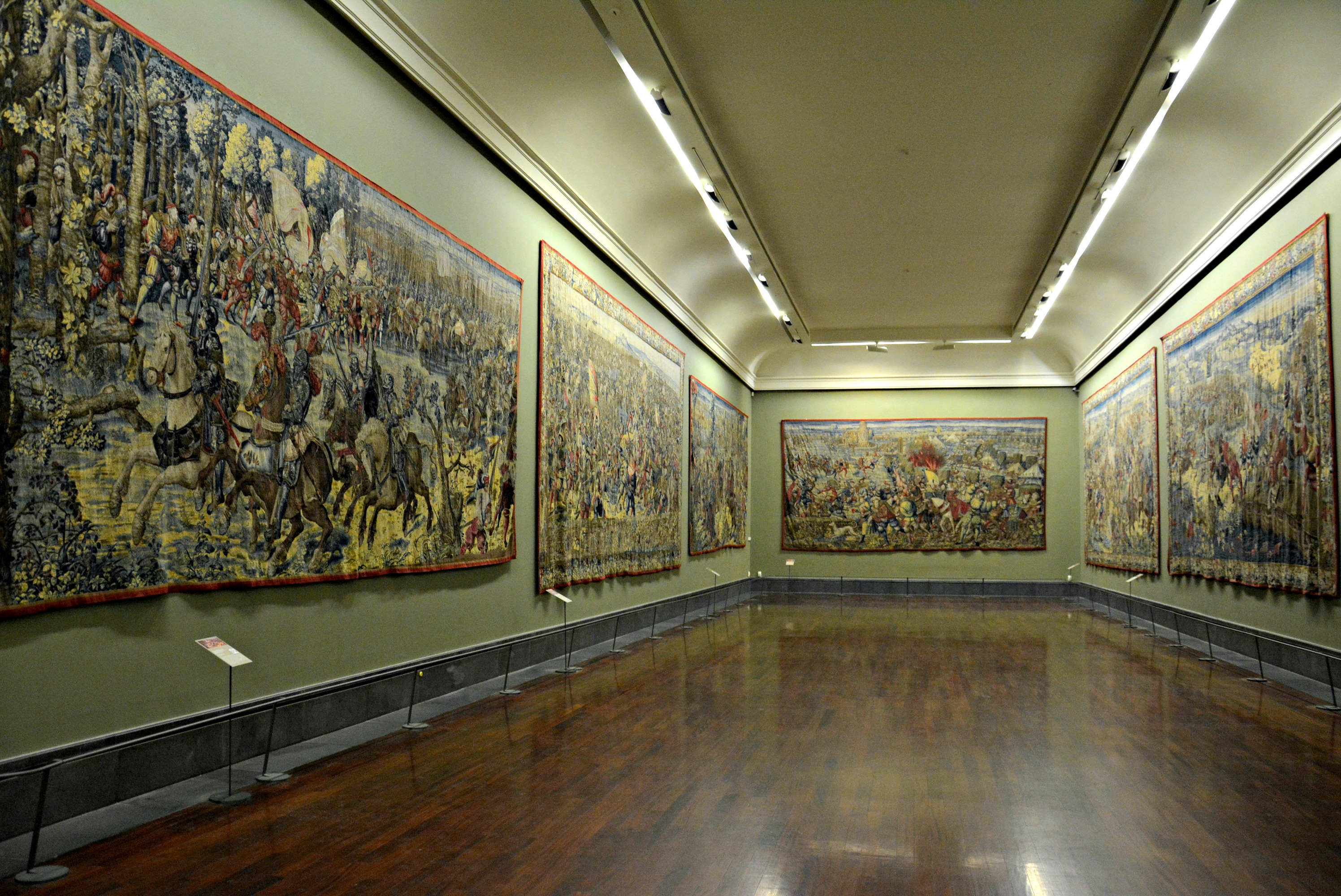 Vedi titolo